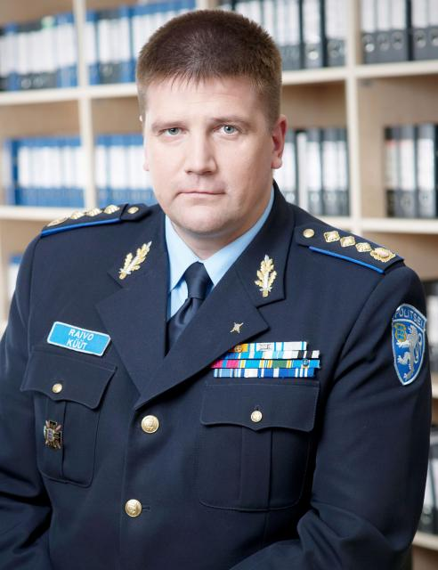 Raivo Küüt